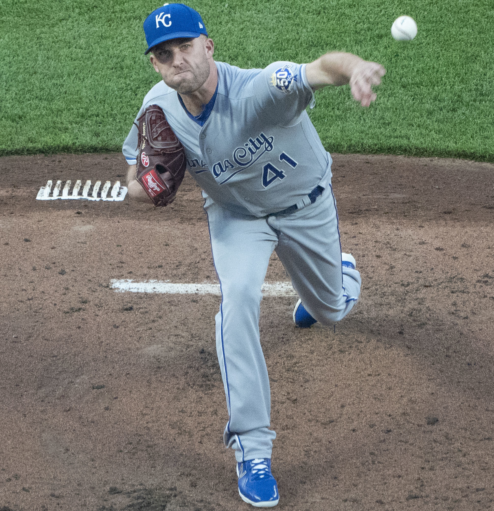 Royals at Orioles 5/8/18